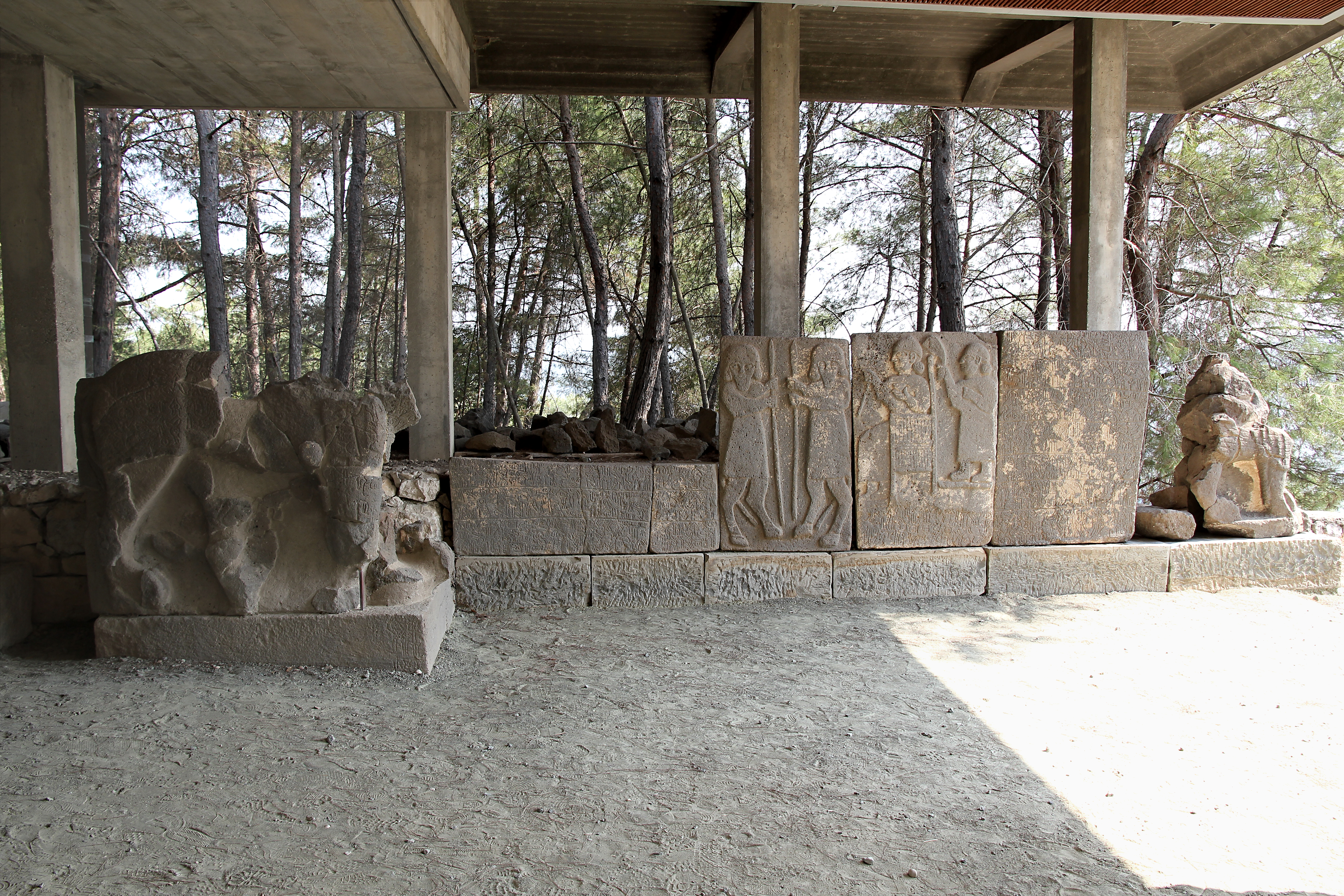 Karatepe (Asatiwataya), neo-hethitischer Fundort bei Osmaniye, Südtürkei, Südtor, rechter Vorhof